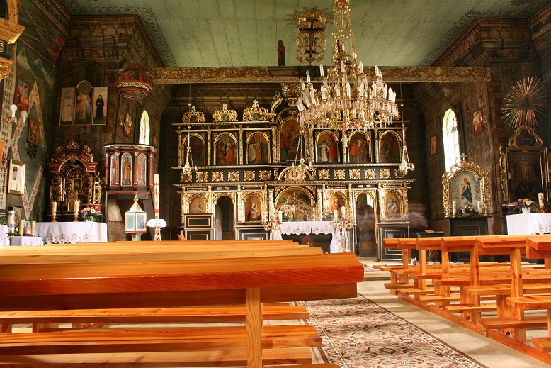 Brunary - pierwotnie cerkiew greckokatolicka pw. św. Michała Archanioła, obecnie kościół rzymskoaktolicki pw. NMP Wniebowziętej, 1831 (wnętrze)